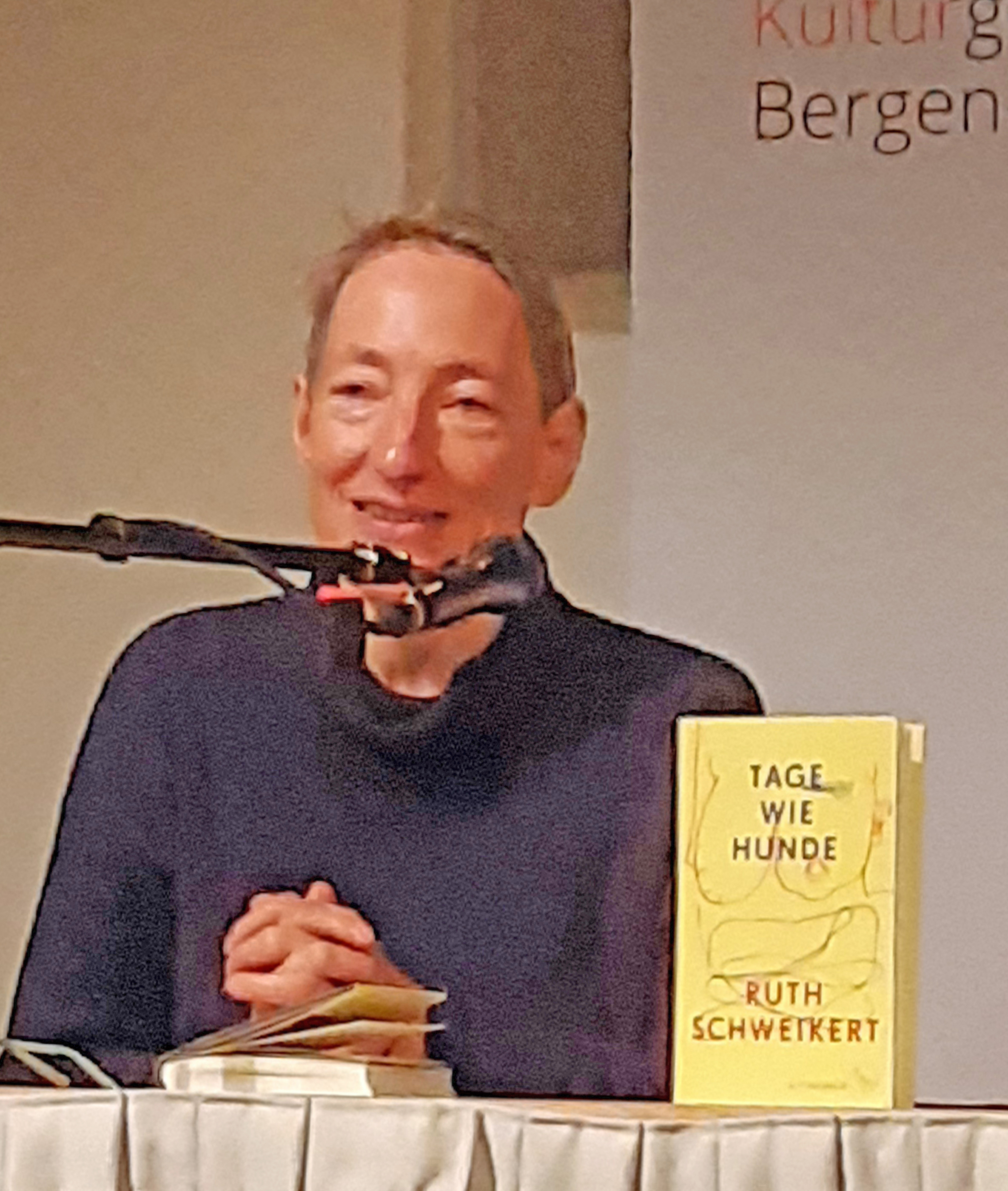 Ruth Schweikert (Stadtschreiberin von Bergen 2015/2016) stellt mit einer Lesung ihr Buch Tage wie Hunde in der Nikolauskapelle in Bergen vor.